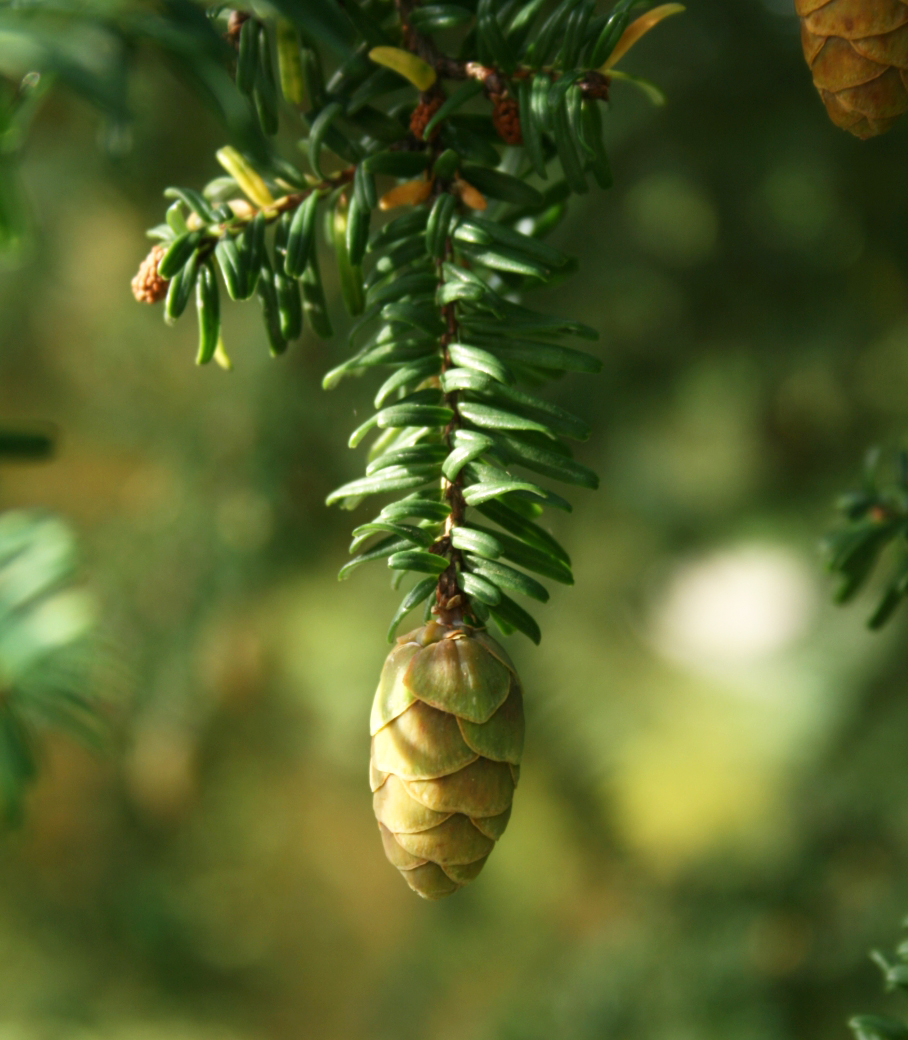 Tsuga sieboldii: Cone